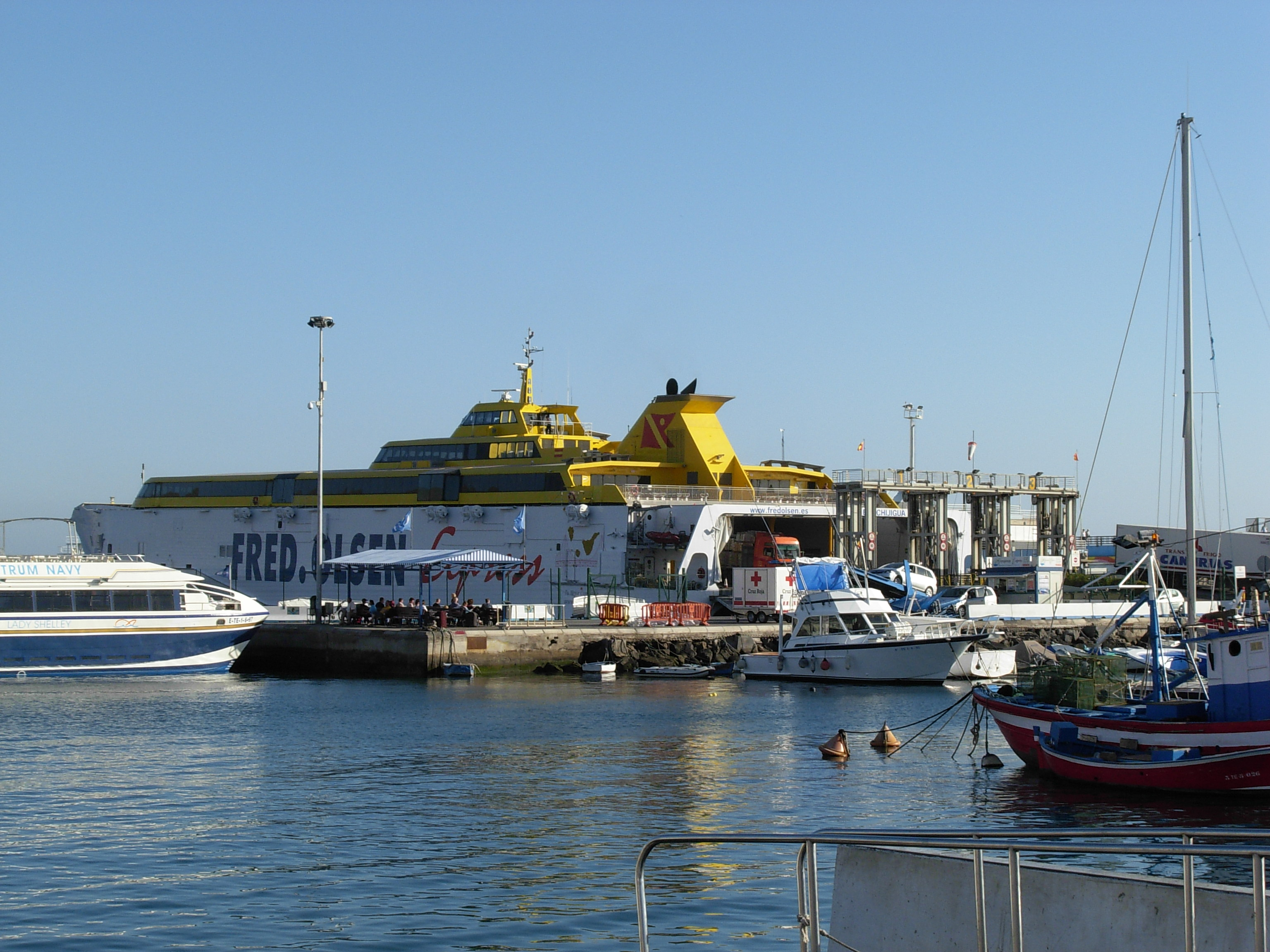 Fast ferry. Benchijigua Express. Puerto de Los Cristianos. Tenerife. Fred. Olsen Express